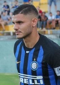 21.07.2018. Италия, Пиза. Третий «Газпром» — тренировочный сбор: товарищеский матч «Интер» — «Зенит».